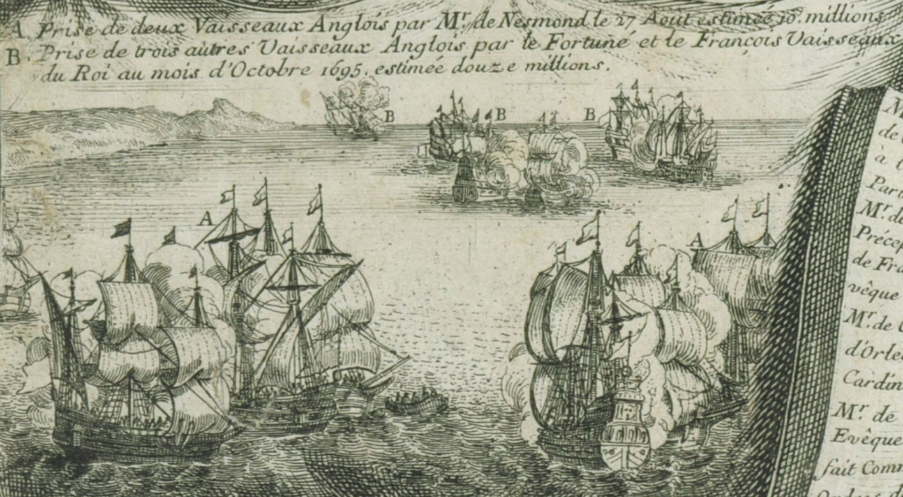 Gravure mettant en scène la capture de plusieurs gros navires par le marquis de Nesmond en 1695 dans la Manche. Guerre de la Ligue d'Augsbourg.